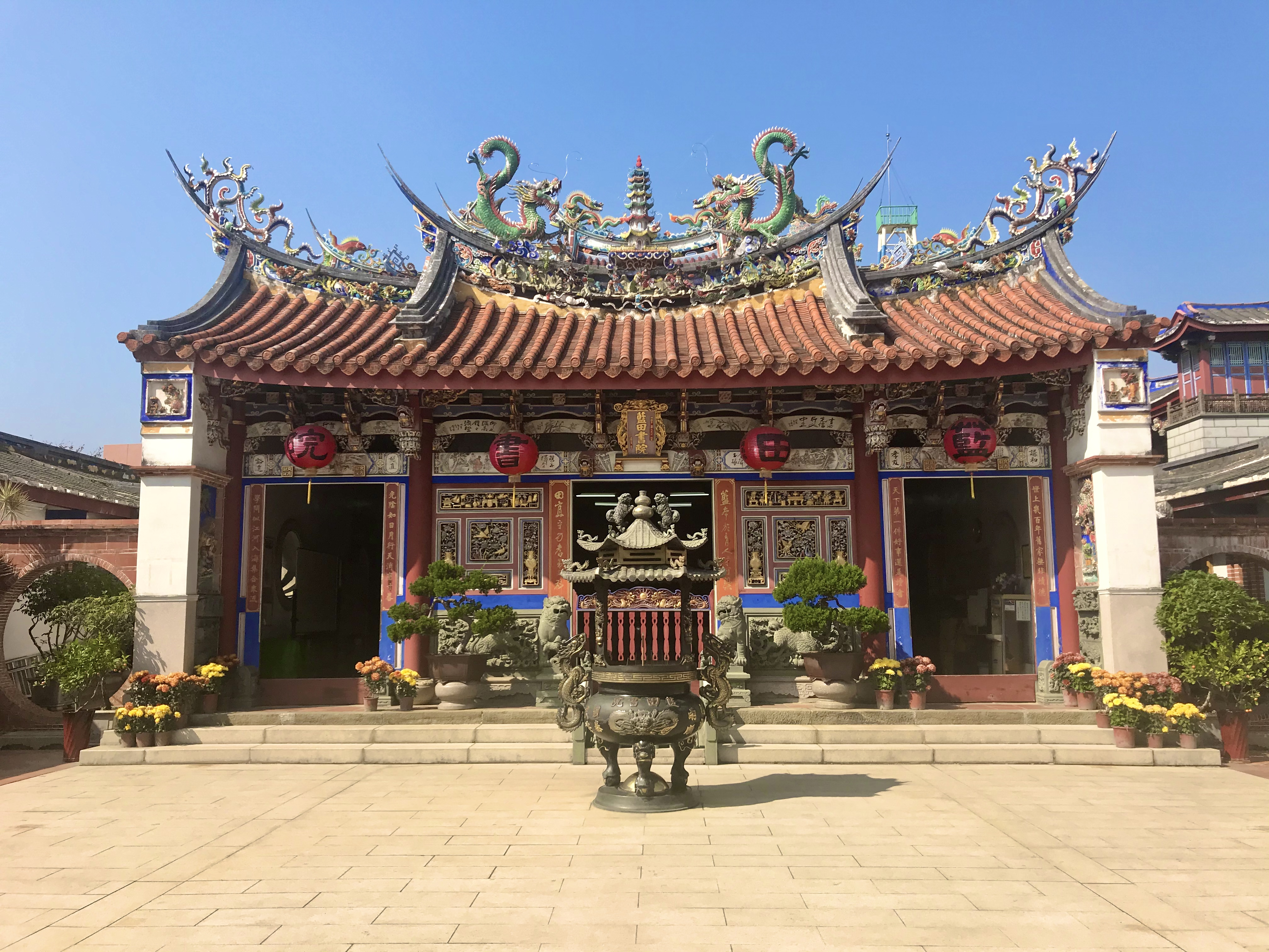 藍田書院主殿